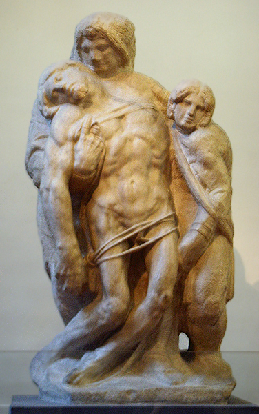 Attributed to Michelangelo: Pietà Palestrina. Galleria dell'Academia, Florence